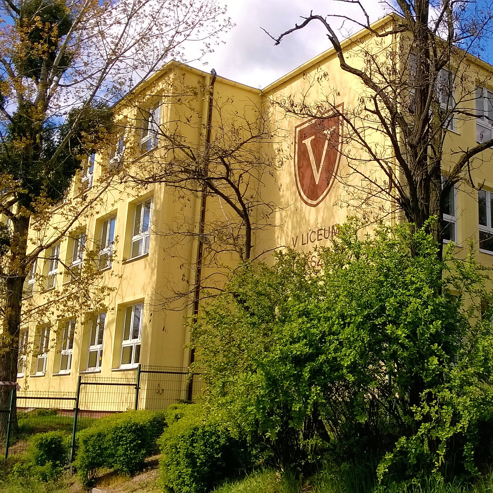 V Liceum Ogólnokształcące im. Jana Pawła II w Toruniu